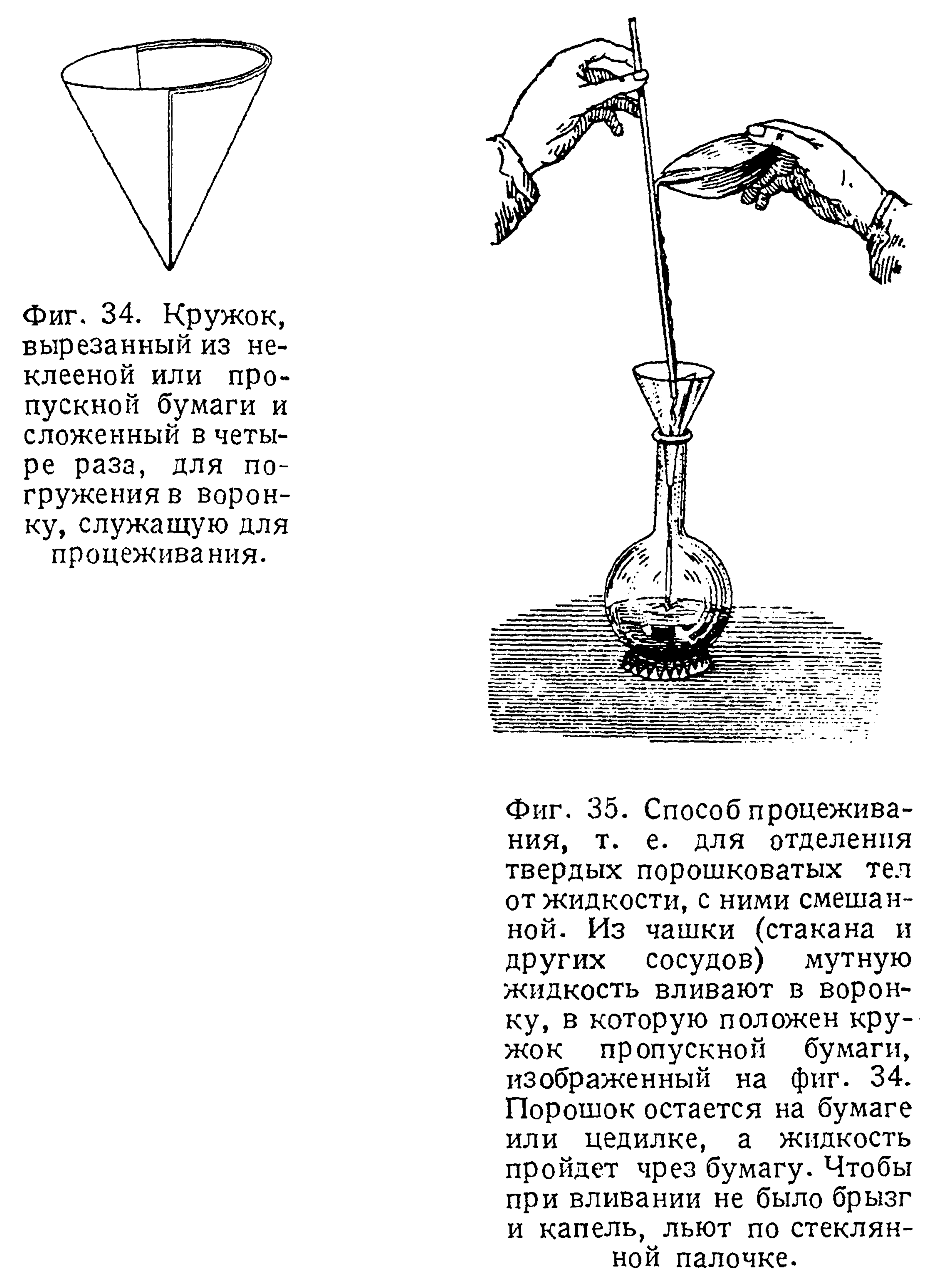 Фильтрование жидкости в лаборатории с помощью воронки с фильтровальной бумагой